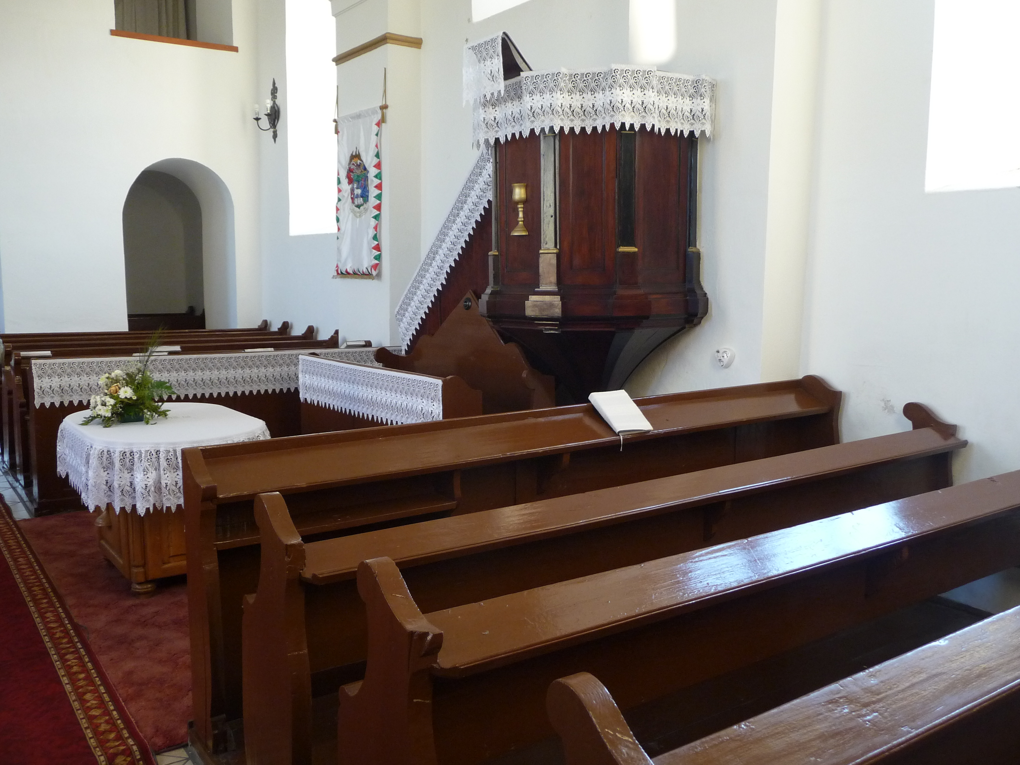 Úrasztala és szószék a református templomban, Bajánsenye